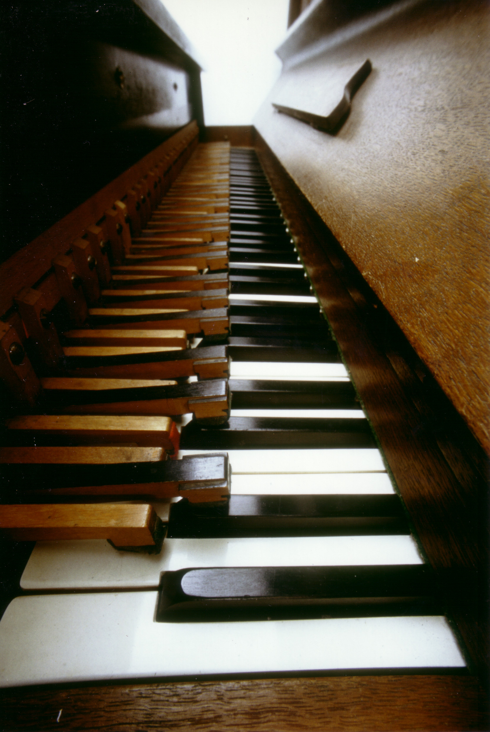 Phonola/Pianola-Vorsetzer. Die Tasten eines Klaviers werden von dem Vorsetzer mit Hilfe von filzbezogenen Holzfingern betätigt.